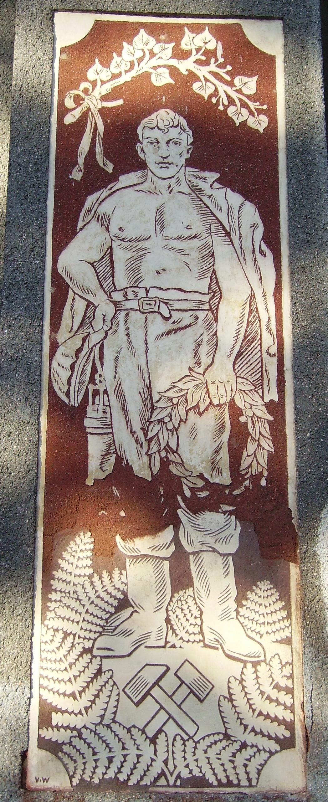 Senov05_sgraf_Wunsche.JPG